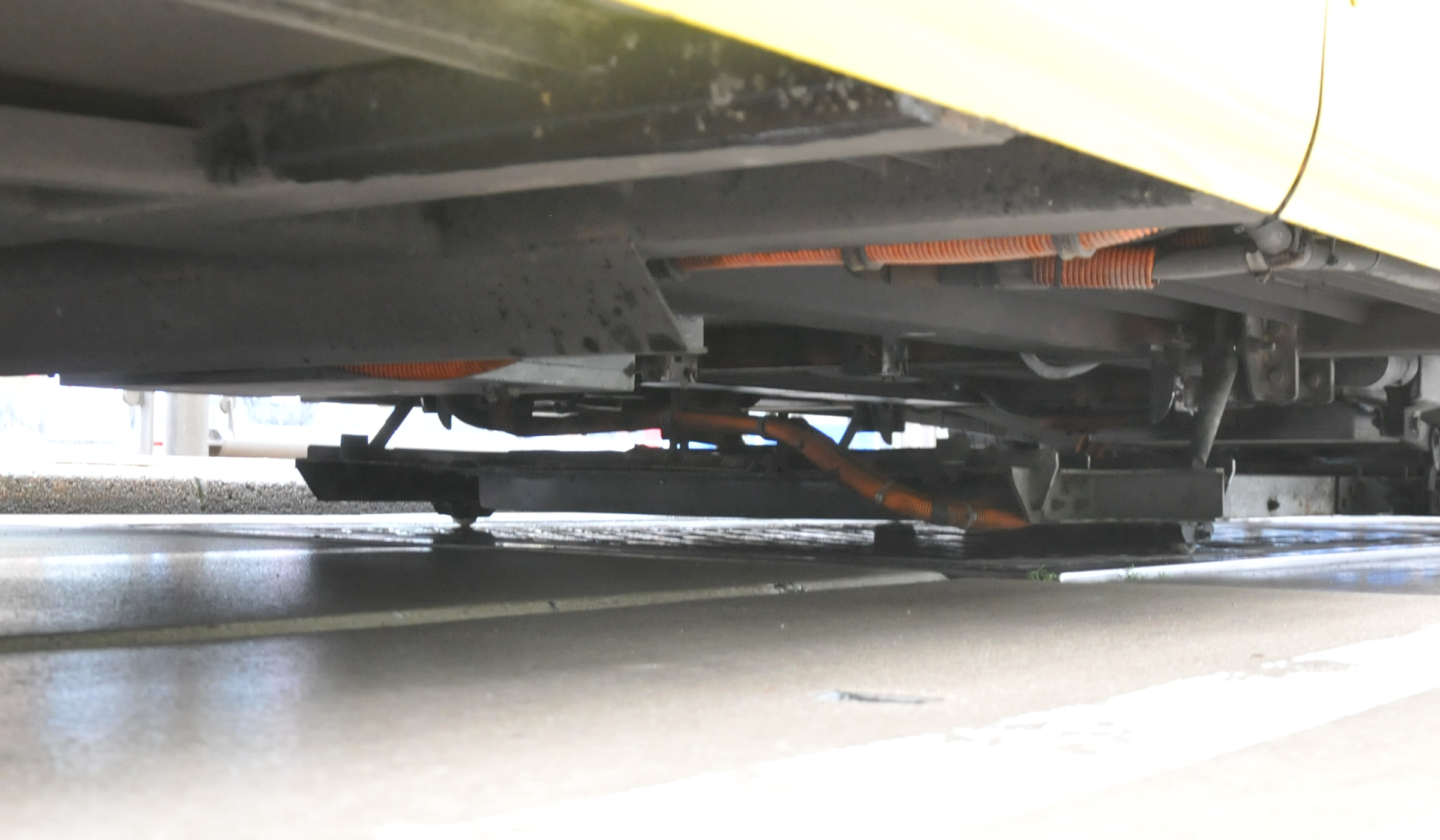 Contactloos stroomoverdracht systeem zoals bij U-OV in gebruik van fabrikant Conductix-Wampfler.